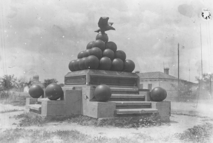 Памятник И.П. Горичу в Очакове (начало 20-го века)